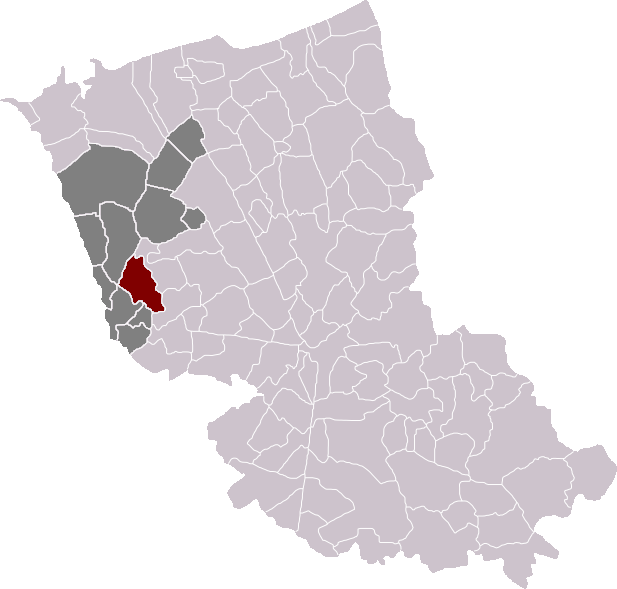 Locatie gemeente Millam in arrondissement Duinkerke. Zelfgemaakt. Location of Millam municipality in the arrondissement of Dunkirk. Self made. Localisation de la commune de Millam dans l'arrondissement de Dunkerque. Fait moi-même.